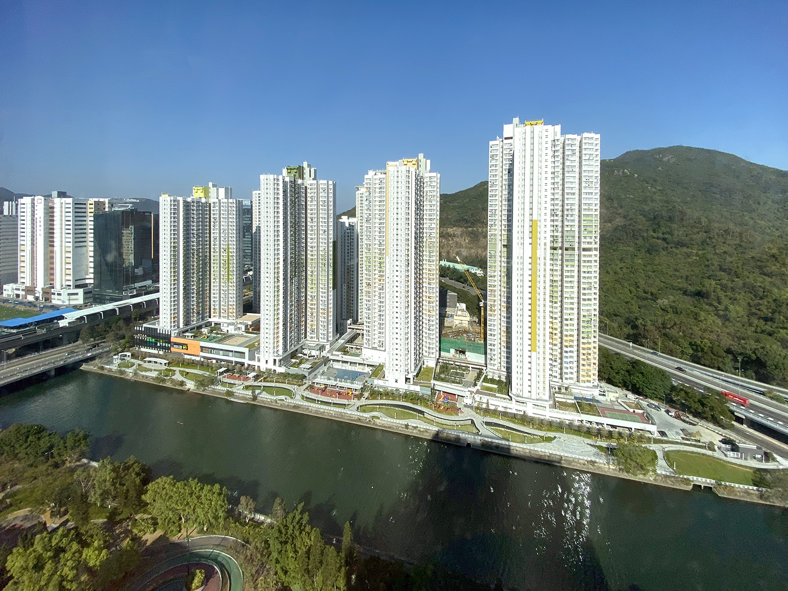 Shek Mun Estate Overview